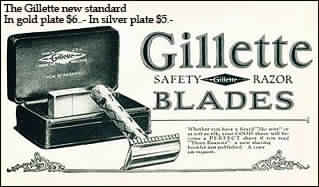 صورة إعلان لعبوة ماكينة حلاقة جيليت